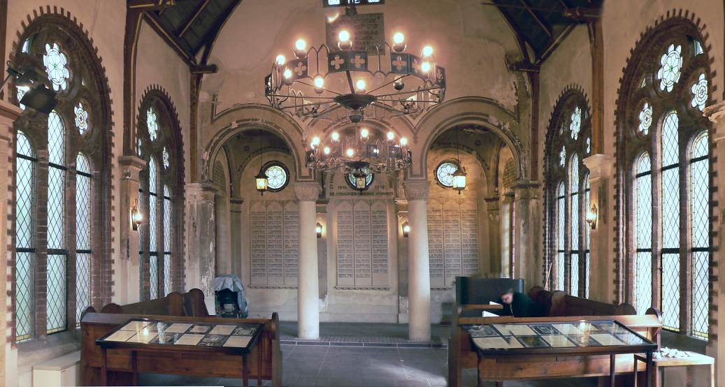 Friedhofshalle Jüdischer Friedhof Strangriede Hannover